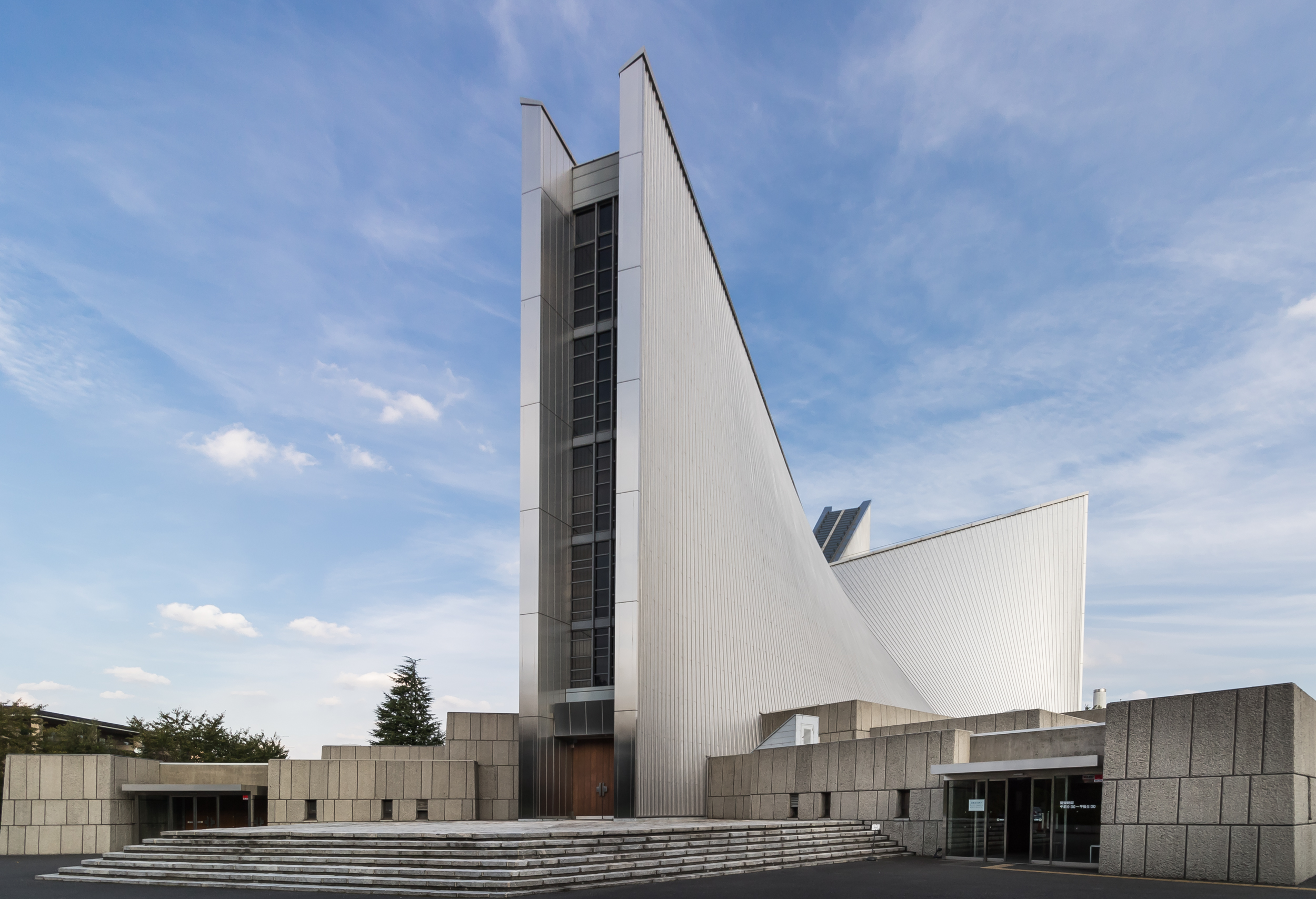 東京カテドラル聖マリア大聖堂（東京都文京区）、 Tange Kenzo.